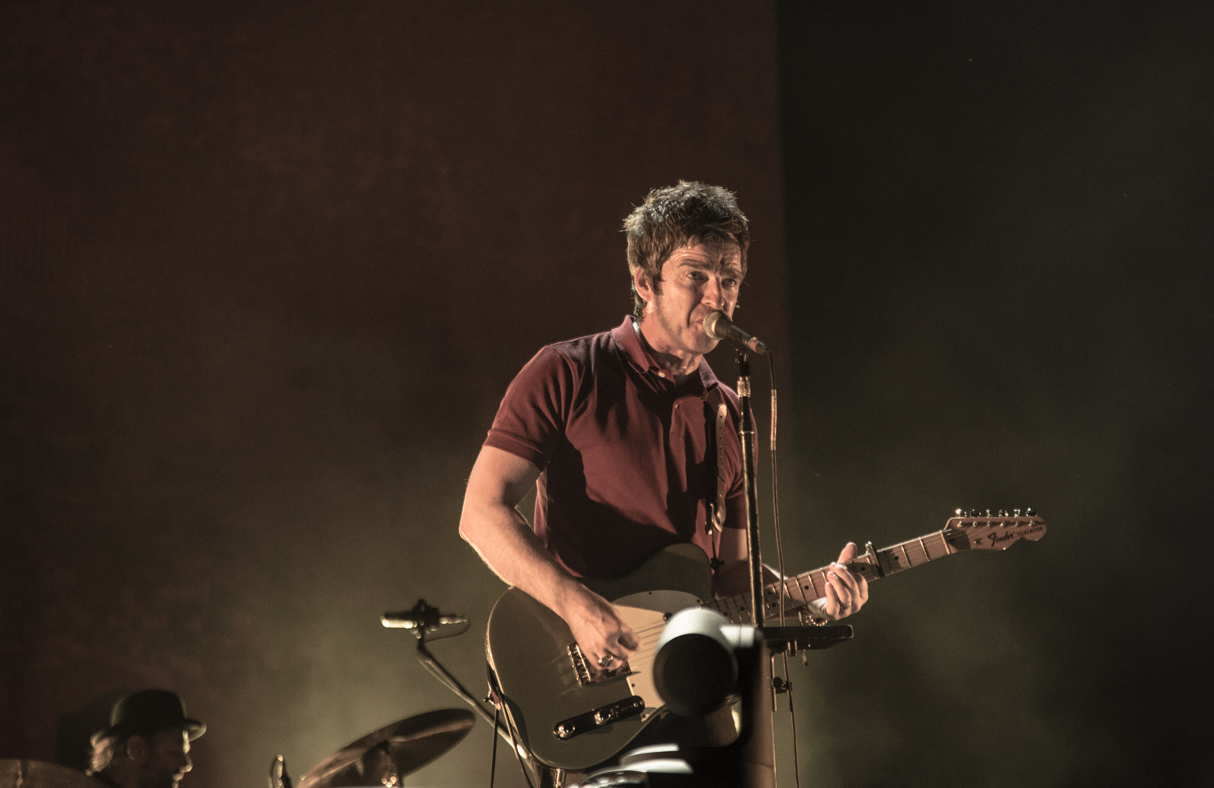 FIB 2015